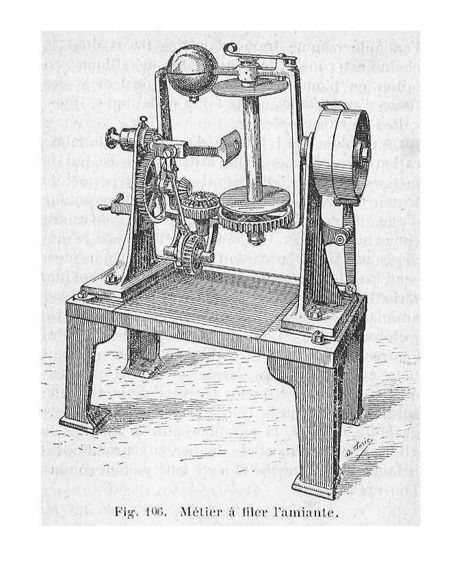 Métier à filerl'amiante